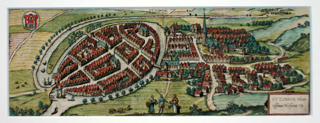 Itzehoe, 1588, 17x48,5 cm, koloriert